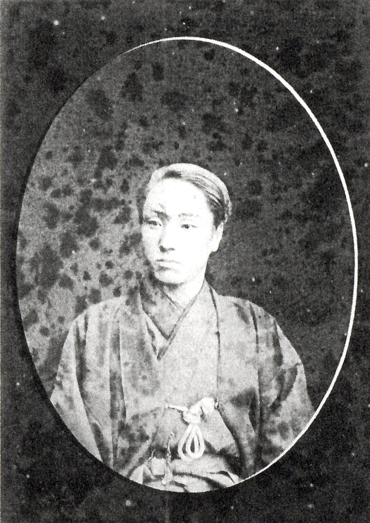 酒井忠匡の肖像写真。